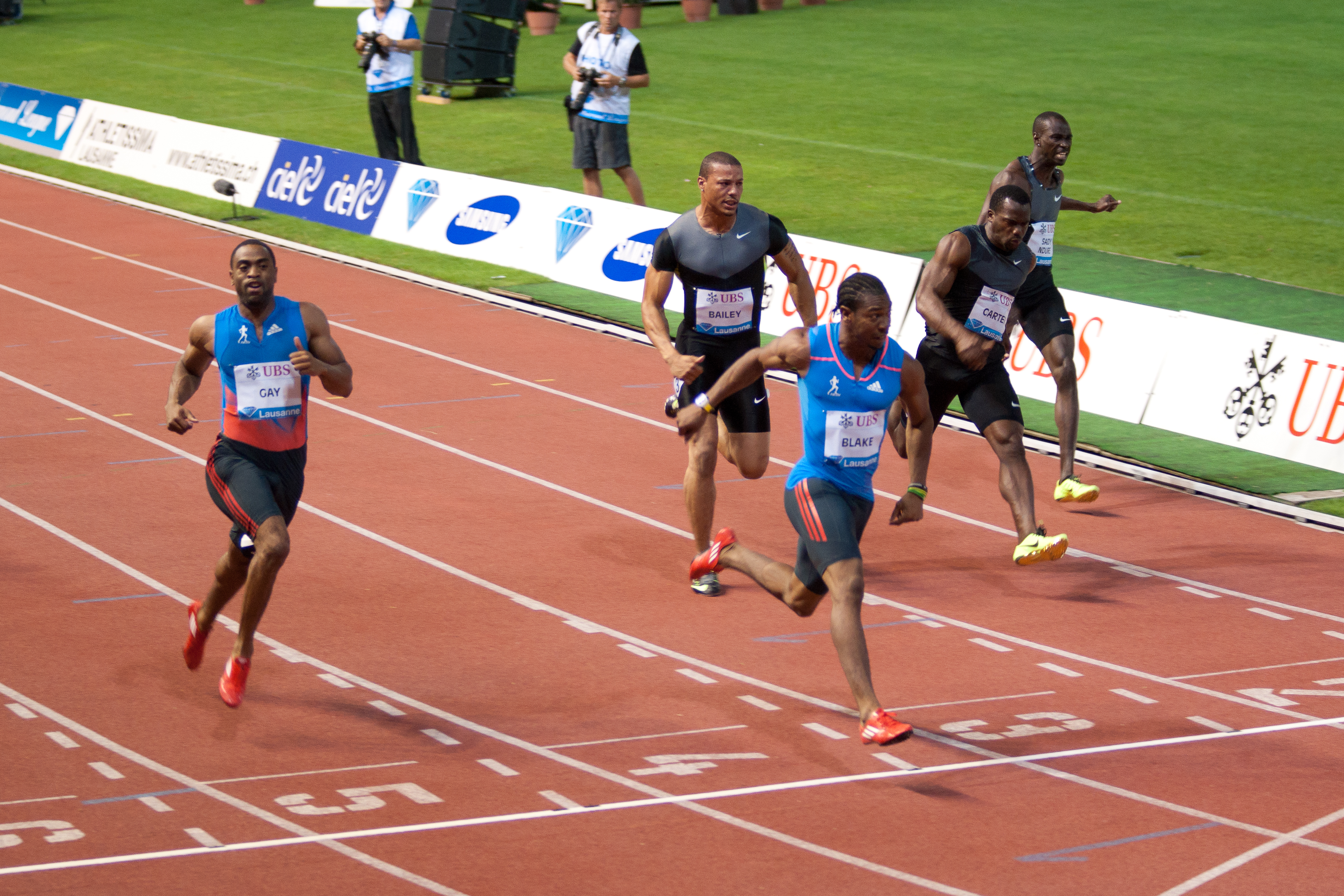 Athletissima 2012 - arrivée du 100m Hommes. Tyson Gay, Ryan Bailey, Yohan Blake, Nesta Carter, Jaysuma Saidy Ndure